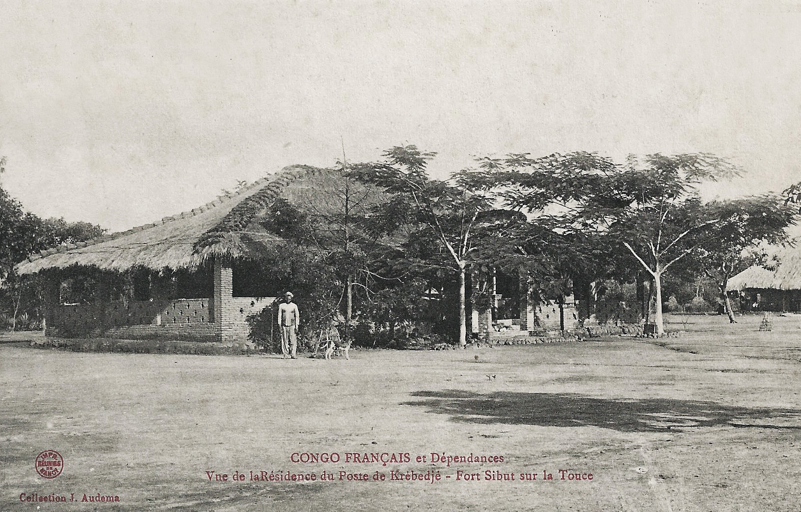 Vue de la Résidence du poste de Krébedjé. Fort Sibut sur la Touce. Collection J. Audema. Phot. A.B. & Cie, Nancy [Albert Bergeret] Congo Français et dépendances